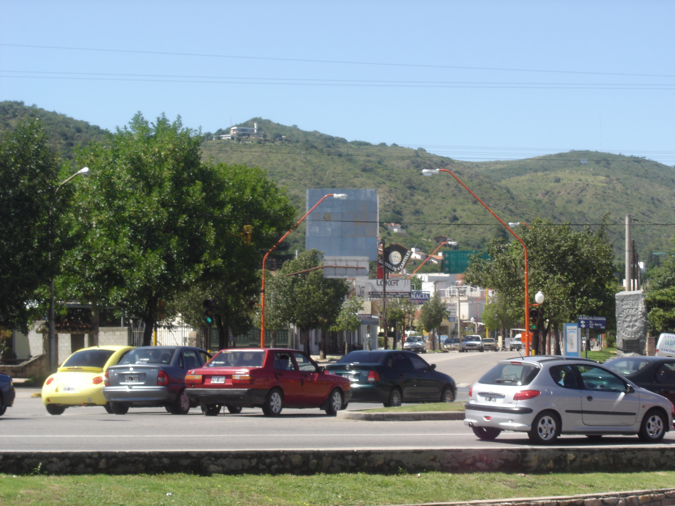 Paisaje de Villa Carlos Paz, Argentina.